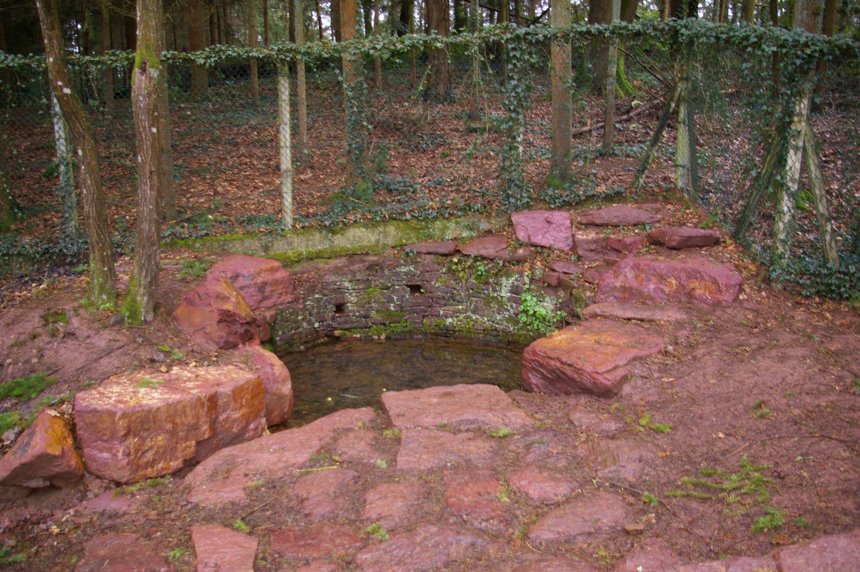 La Fontaine de jouvence dans la forêt de Brocéliande